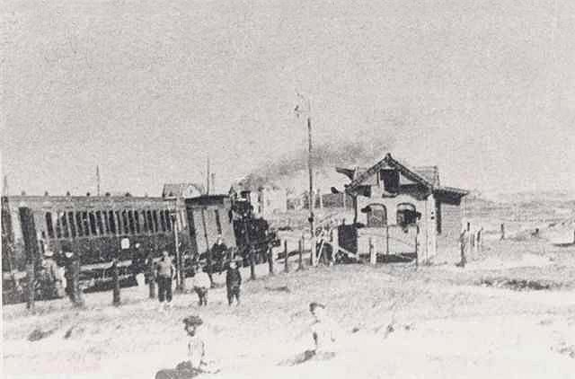 Halte Zandvoort Dorp